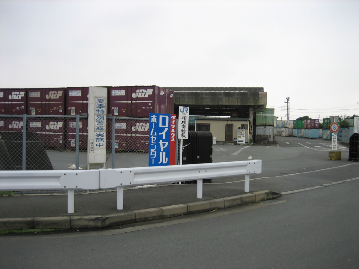 相模貨物駅入口